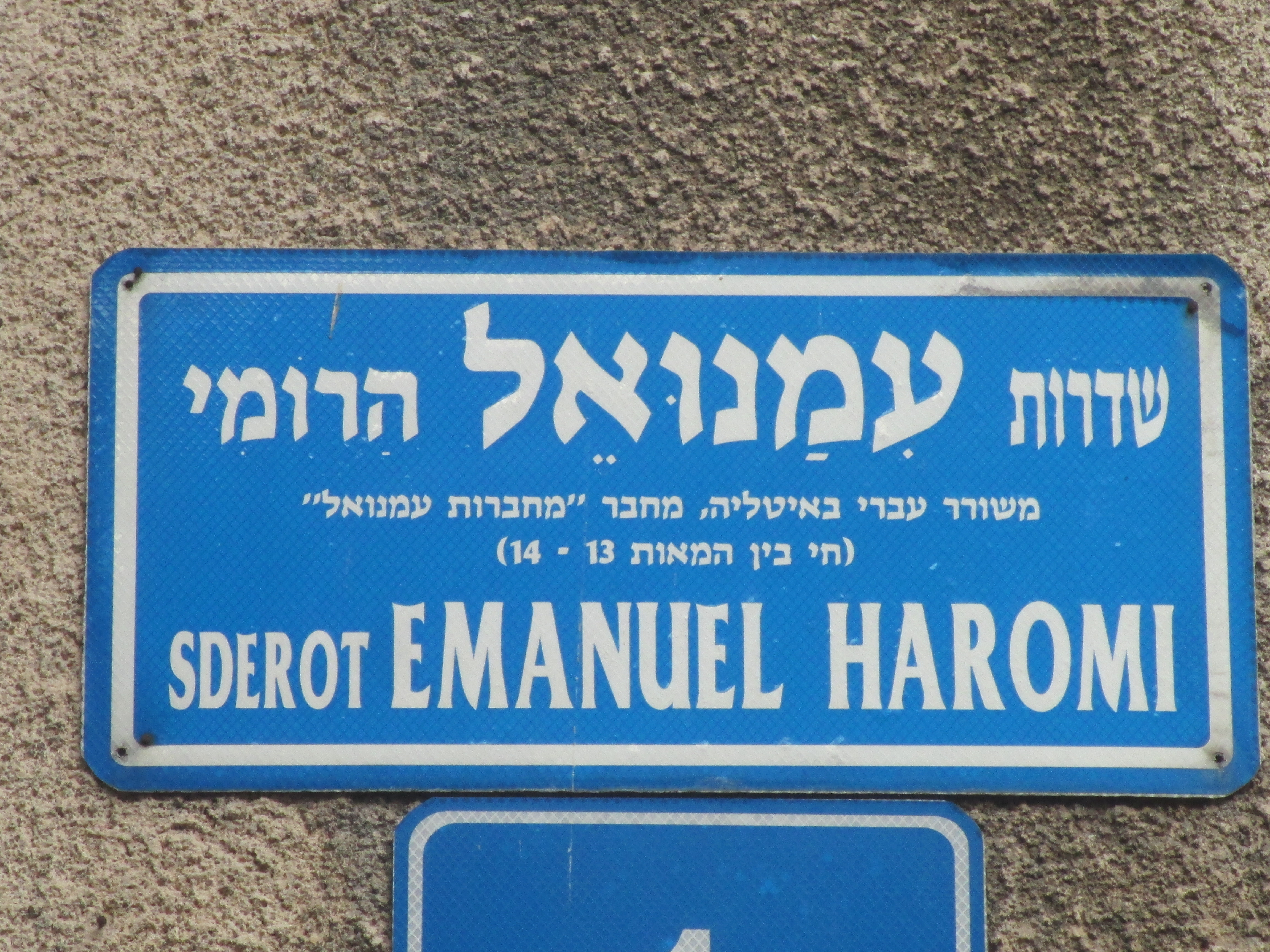 שלט רחוב שדרות עמנואל הרומי בתל אביב